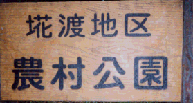 青森県、埖渡地区農村公園の看板。